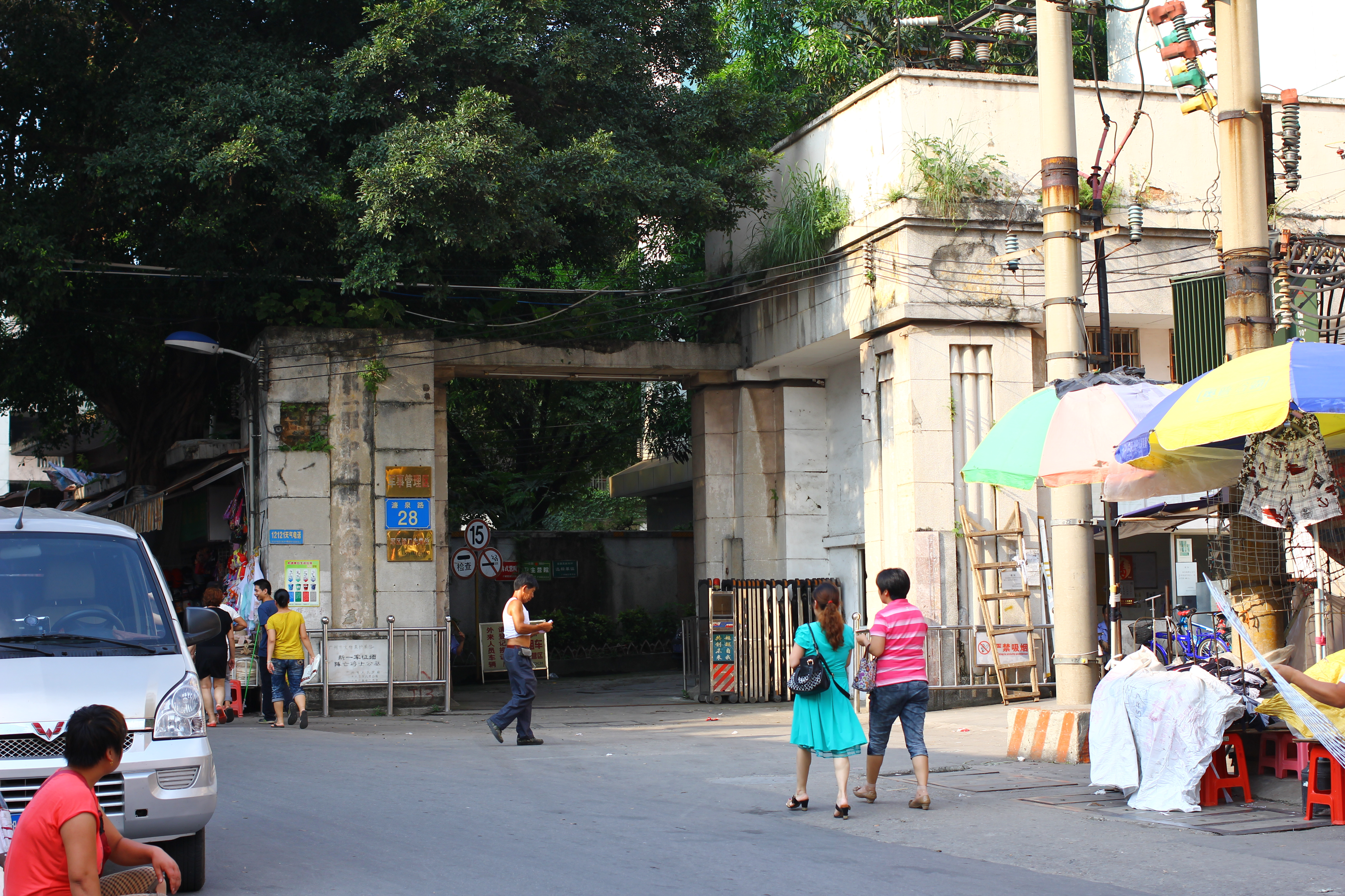 位於廣州市沙河濂泉路的新一軍征緬陣亡將士公墓，大門門牌（右）由孫立人題字，因破壞及沒有保養的緣故，現已幾乎不可辨認。原大門範圍目前仍然被解放軍作為軍區佔用。當局還打算把此歷史建築物（及紀念塔、記功亭）清拆，另外在長洲島重建複製品。